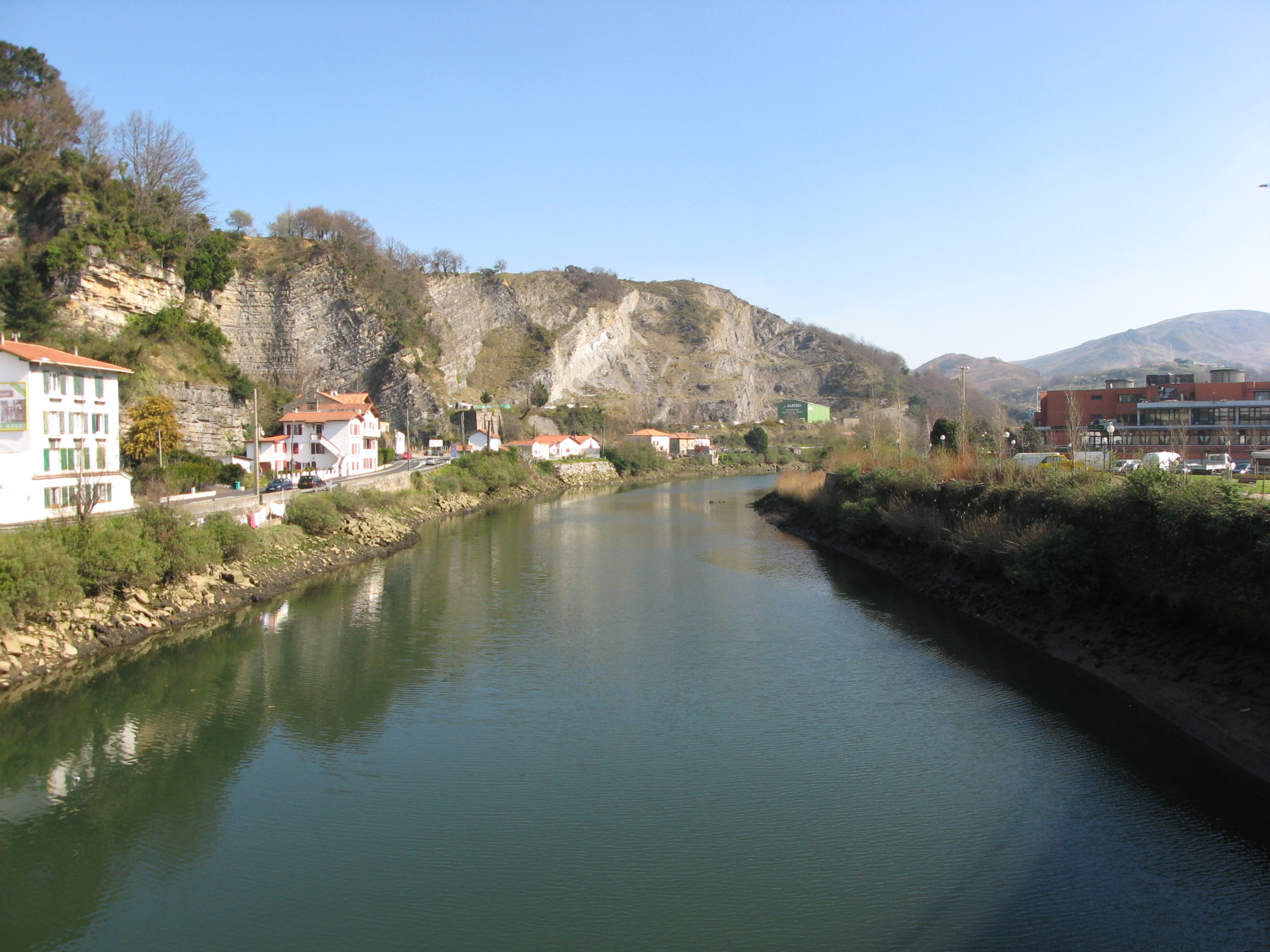 La Bidassoa, vue vers l'est et vers l'amont depuis le pont de Béhobie. Le pont de Béhobie est à cheval entre la commune française d'Urrugne (Pyrénées-Atlantiques, ouest des Pyrénées), et celle d'Irun en territoire espagnol. Irun possède donc la rive gauche vue ici - celle sur la droite de la photo, puisque nous regardons vers l'amont. Mais seulement environ 90 m de rivière longent le territoire d'Urrugne, dont environ 20 m en amont du pont (devant nous) et 70 m en aval du même pont (derrière nous). Toute la berge en rive droite vue ici (sur le côté gauche de la photo), y compris la première maison vue partiellement à gauche de la photo, est donc sur le territoire de la commune française de Biriatou, qui jouxte la limite sud-ouest d'Urrugne. On ne voit aucune portion de la rivière sur le territoire d'Urrugne.